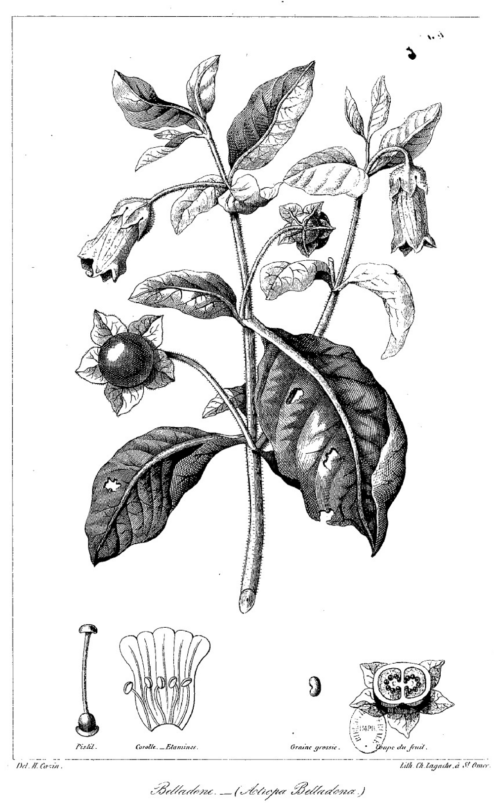 François-Joseph Cazin, Monographie médico-pratique et bibliographique de la belladone, 1856.